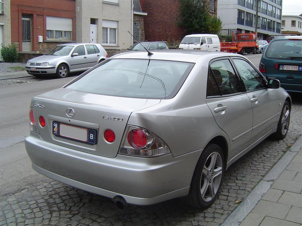 Lexus IS200 arrière